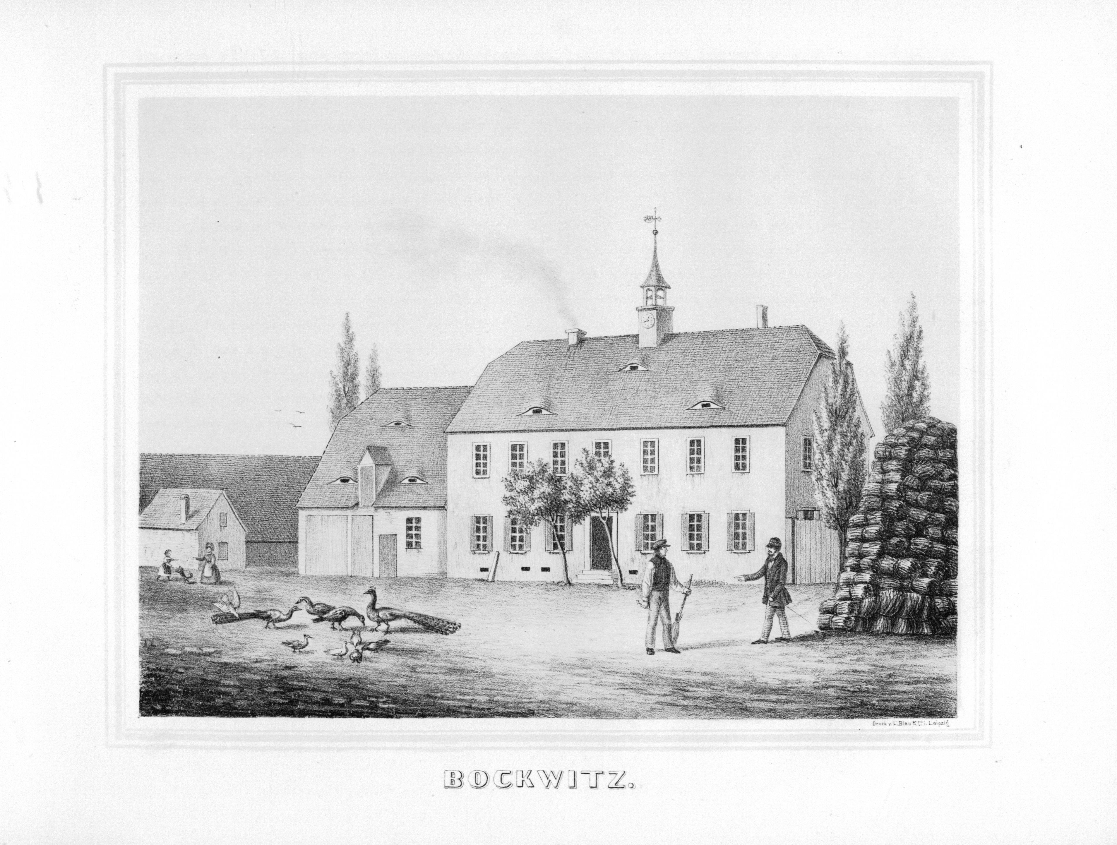 Bockwitz aus: Album der Rittergüter und Schlösser im Königreiche Sachsen Leipziger Kreis Section: I